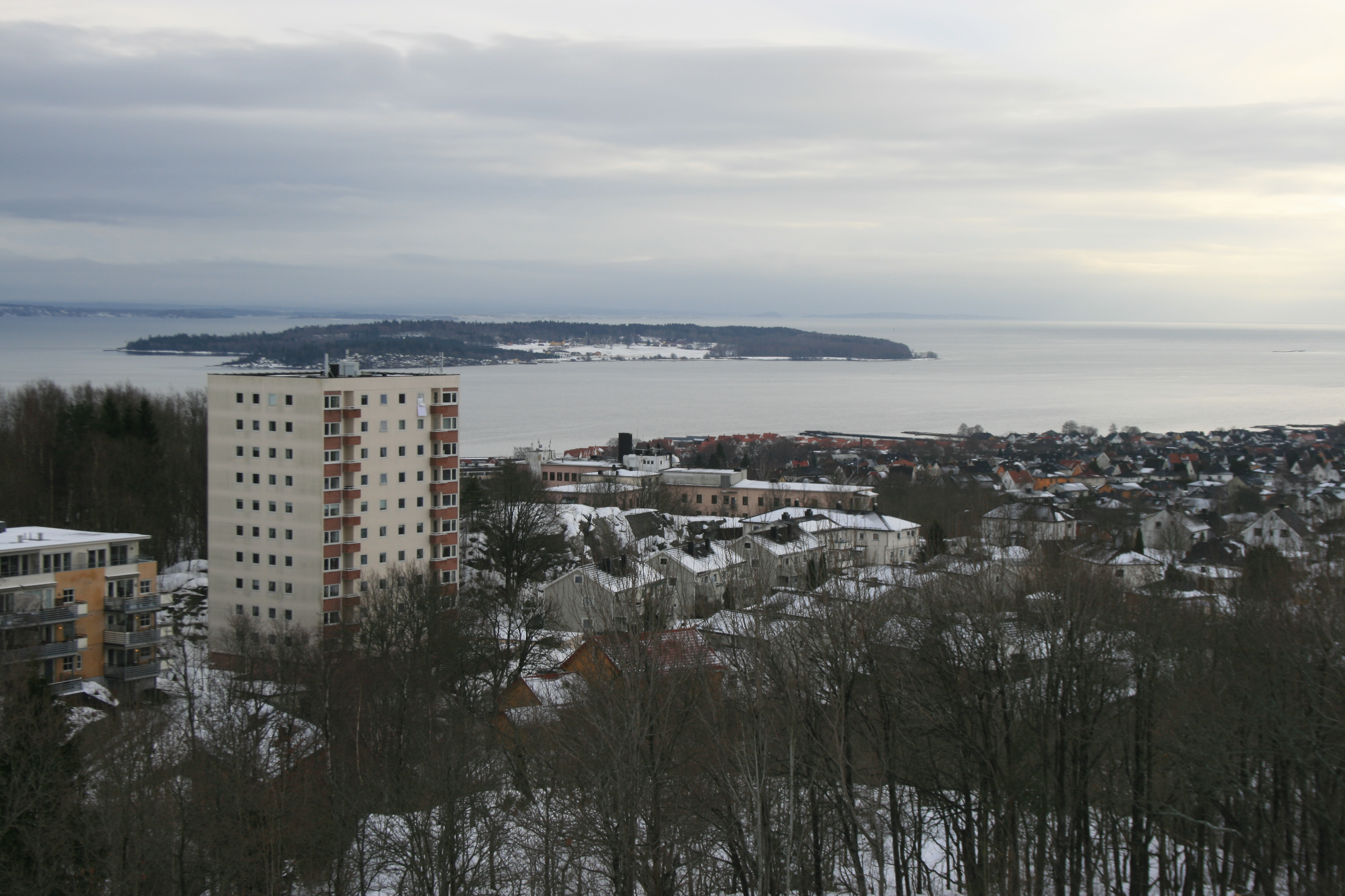 Byen og Bastøy.